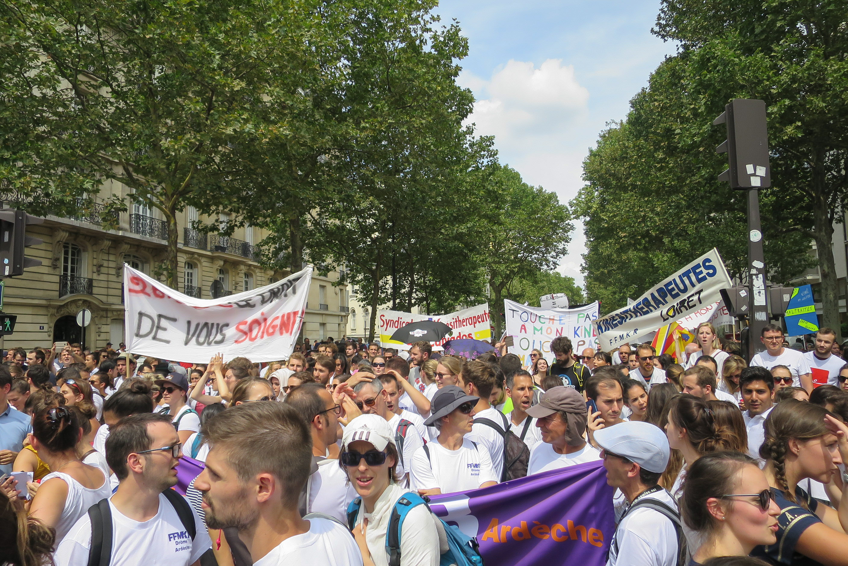 Manifestation de kinésithérapeutes, place Pierre-Laroque à Paris (France), le 5 juillet 2018, à proximité du ministère de la Santé.